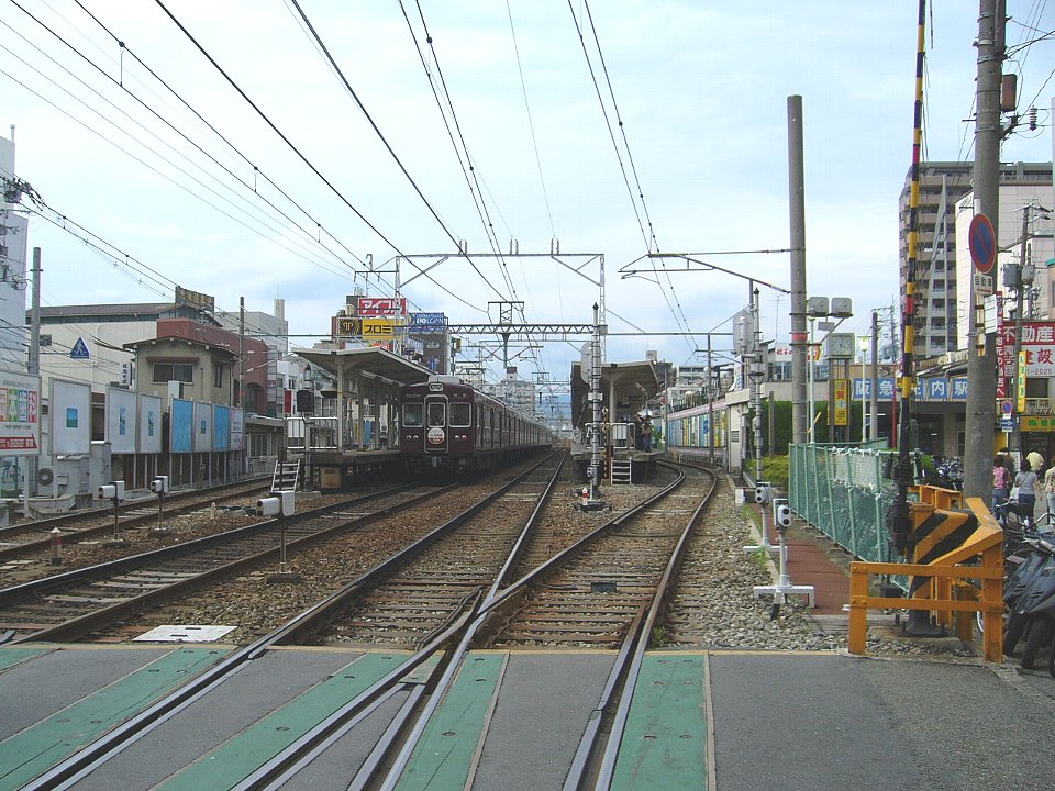 阪急宝塚本線 庄内駅 踏切から駅構内を北望 右手に東入口が見える